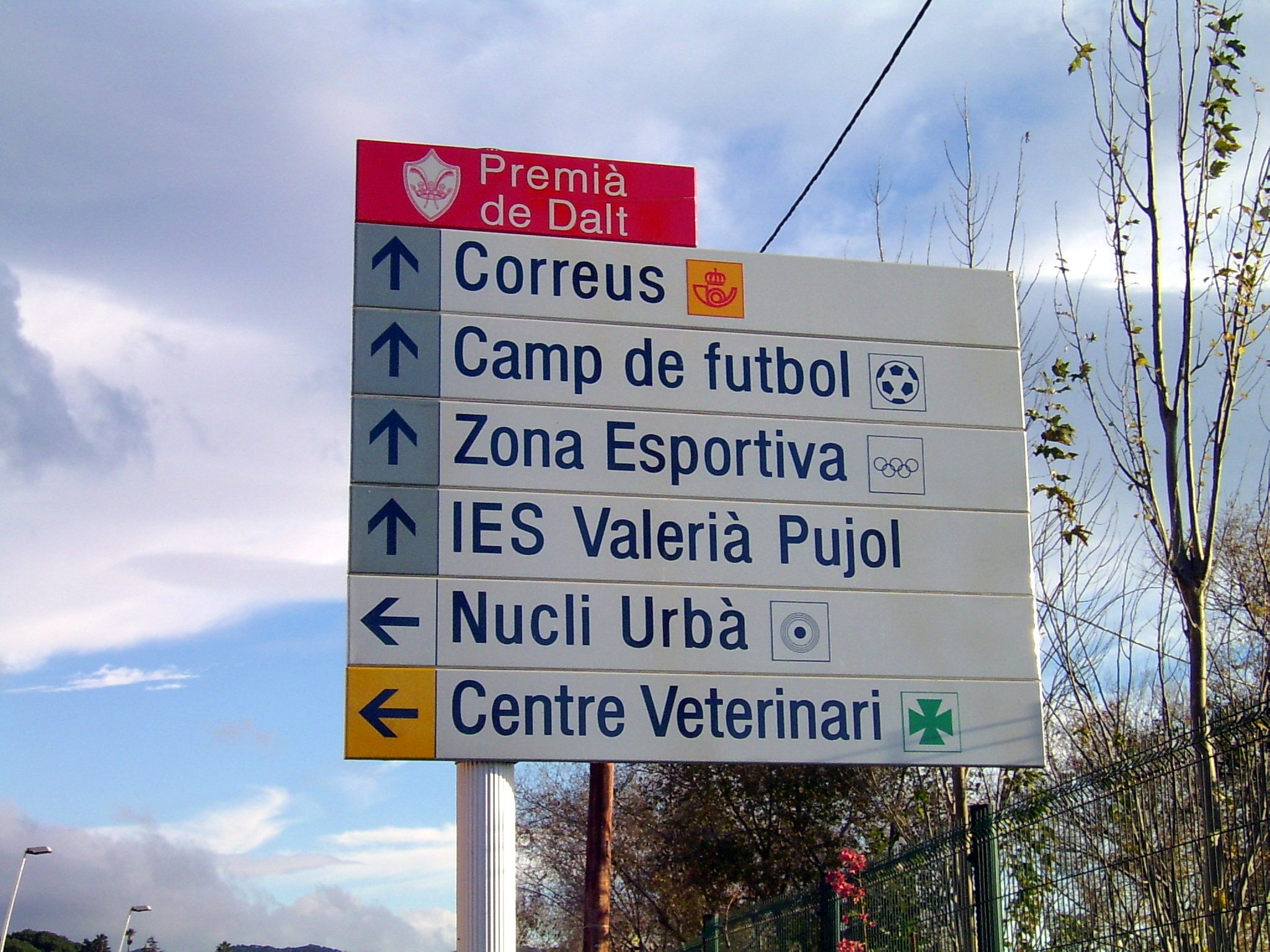 Senyal indicadora, a Premià de Dalt.A baix a l'esquerra, el focos del camp de futbol.